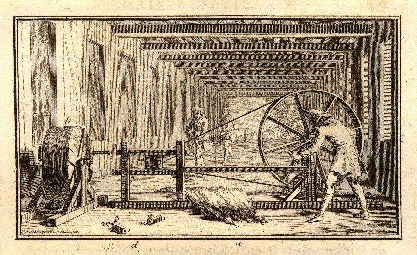 Fileurs à l’œuvre au 17ème siècle